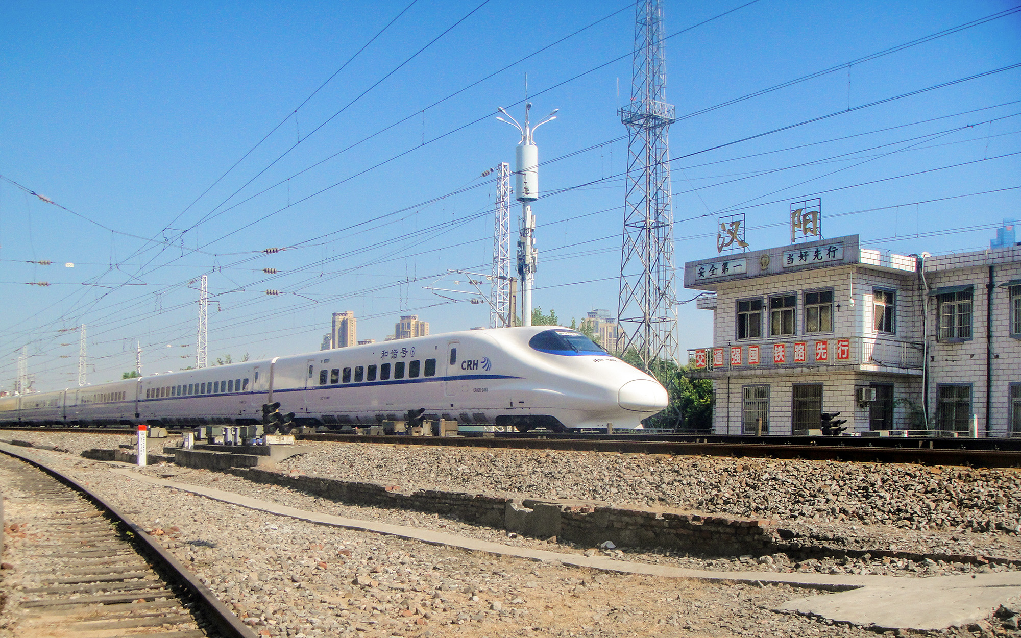 0D5243 次动车组列车开往武昌站